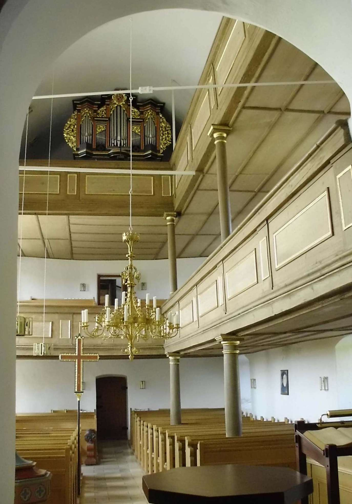 Evang.-Luth. Pfarrkirche St. Michael in Pfofeld im Landkreis Weißenburg-Gunzenhausen, Kircheninneres, Blick nach Westen